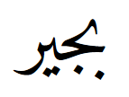 Буджайр